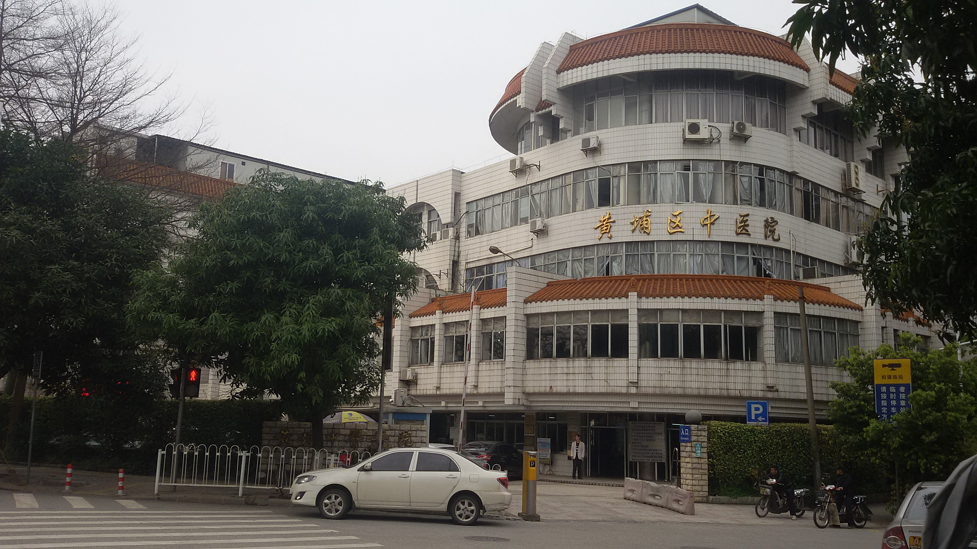 粵語: 黃埔區中醫醫院